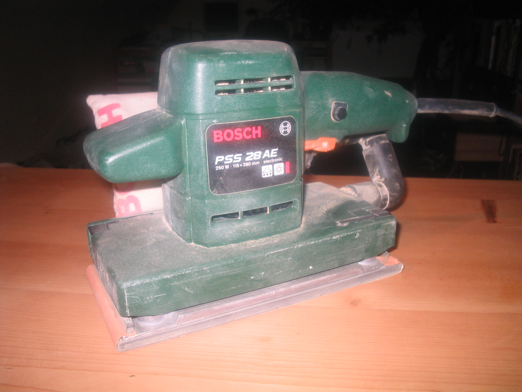 Schwingschleifer